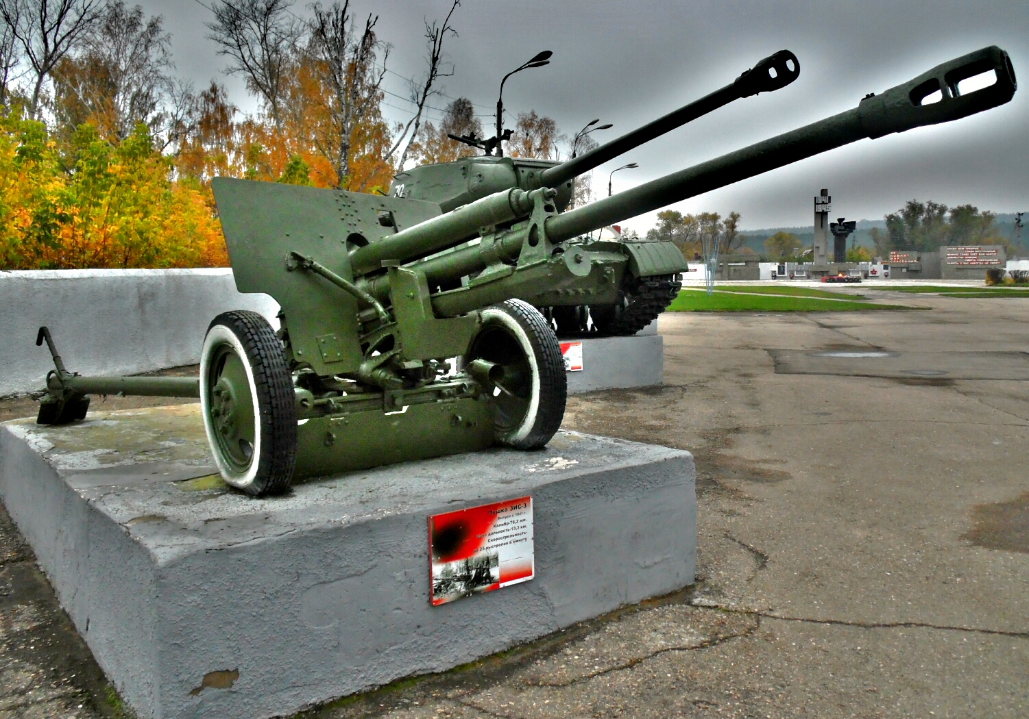 76-мм дивизионная пушка образца 1942 года (ЗИС-3, Индекс ГАУ - 52-П-354У) - 76,2-мм советская дивизионная и противотанковая пушка. Главный конструктор - В. Г. Грабин, головное предприятие по производству - артиллерийский завод № 92 в городе Горьком. ЗИС-3 стала самым массовым советским артиллерийским орудием, выпускавшимся в годы Великой Отечественной войны.